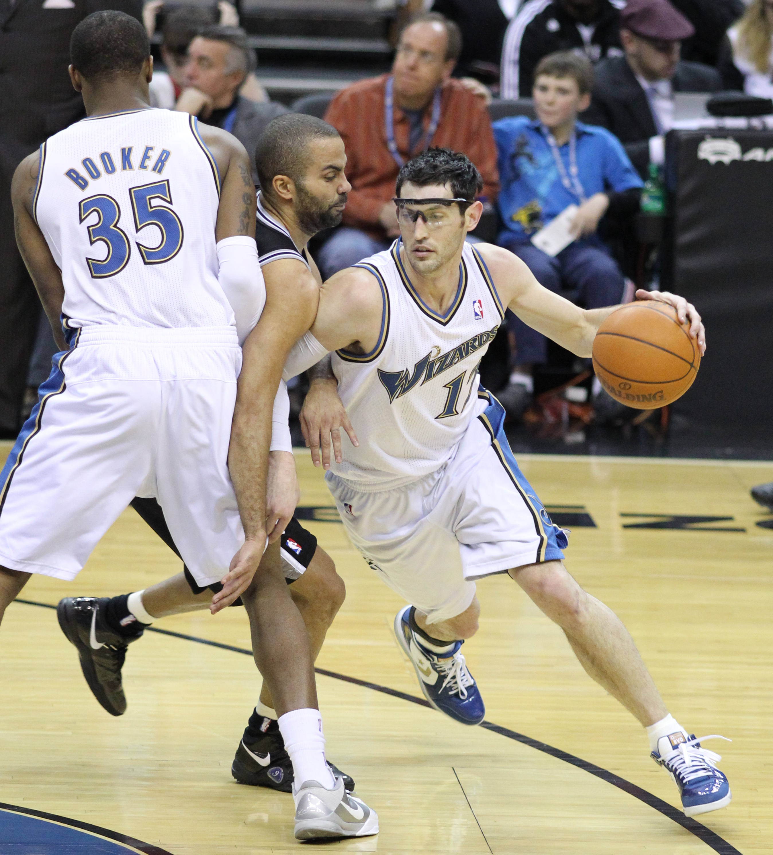 Wizards v/s Spurs 02/12/11